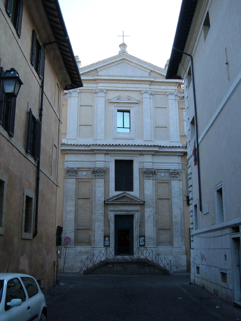 Eglise de Saint Jacques à la Lungara, à Rome, dans le "rione Trastevere".